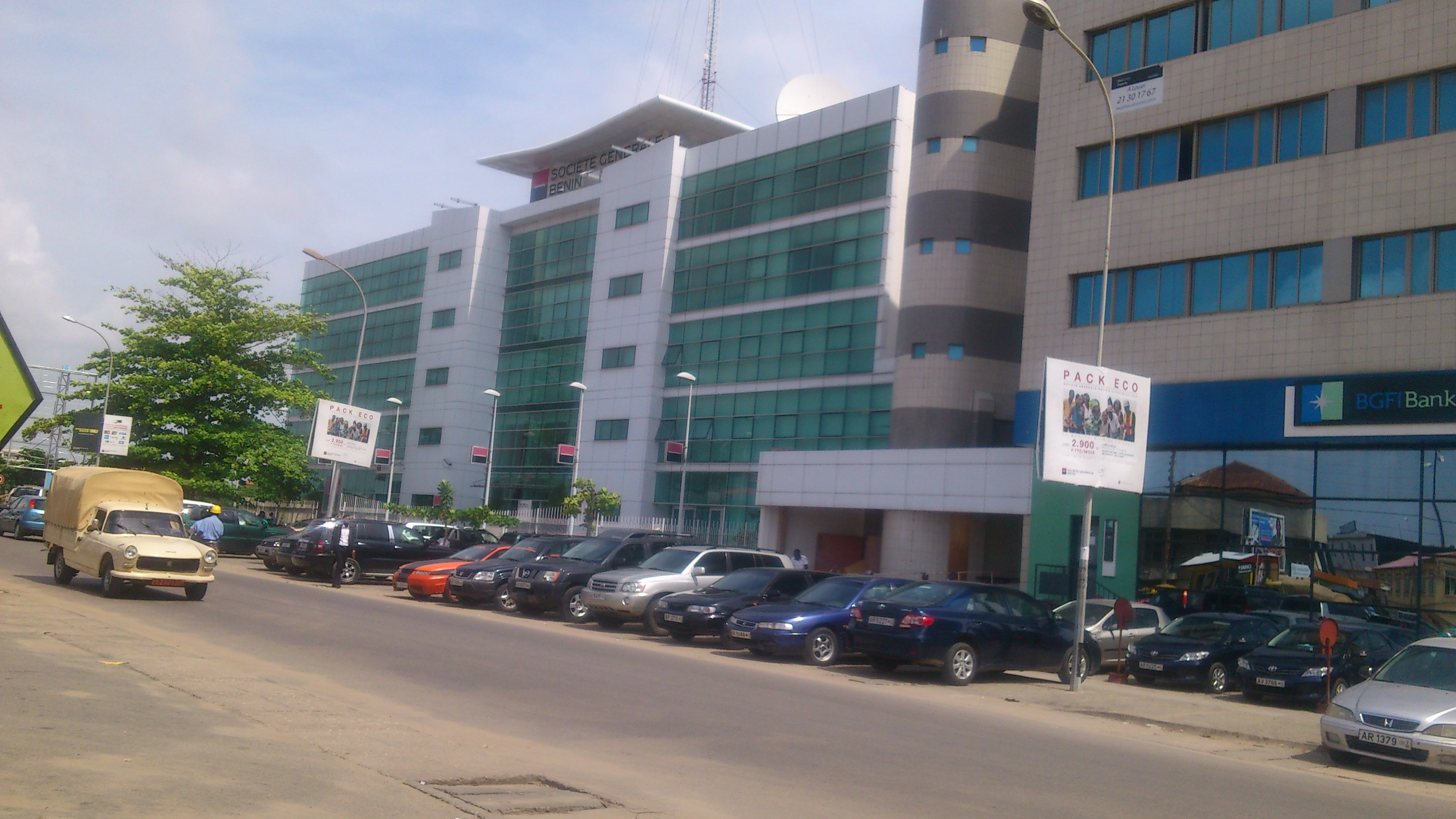 Rue de Ganhi Cotonou Bénin.